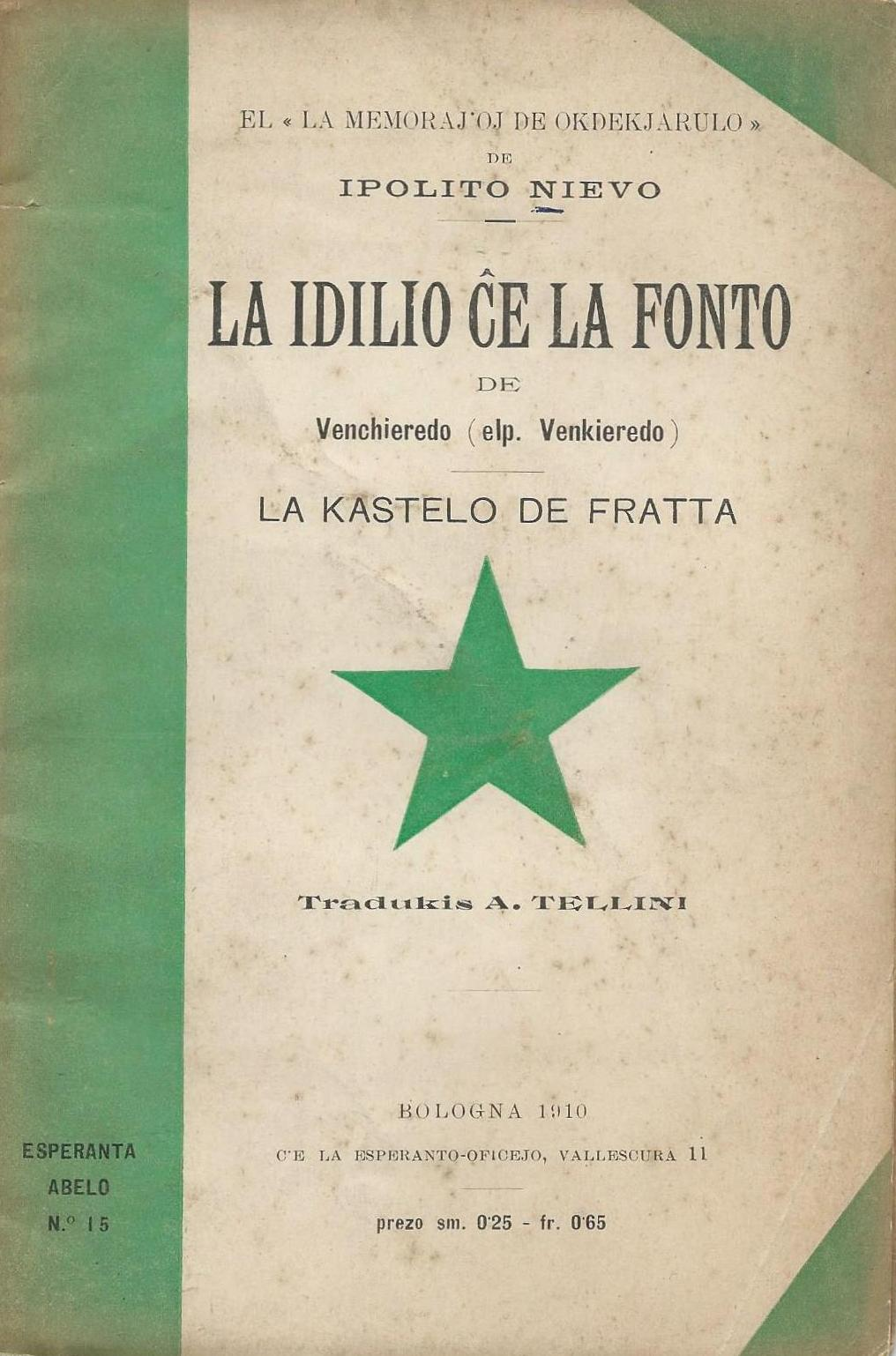 Librokovrilo de "La Idilio ĉe la Fonto",1910